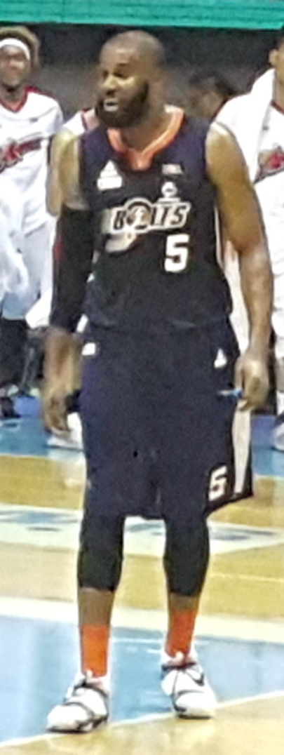 PBA - Meralco vs Alaska - Arinze Onuaku - Meralco - 2016-0425